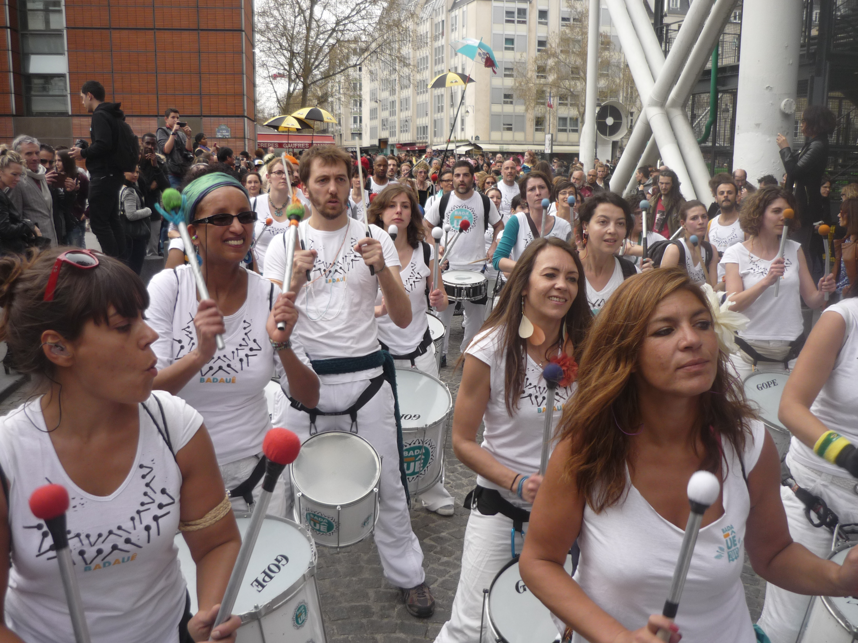 La batucada Badauê rue Saint Merri.